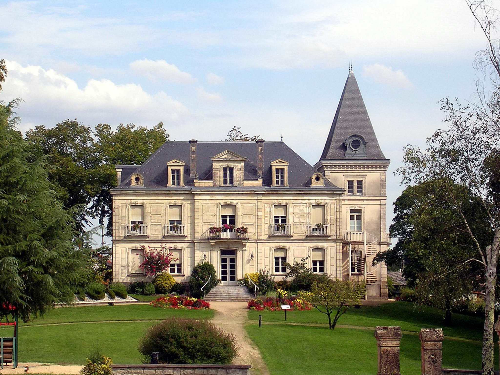 Château Bellegarde, à Rion-des-Landes, dans le département français des Landes